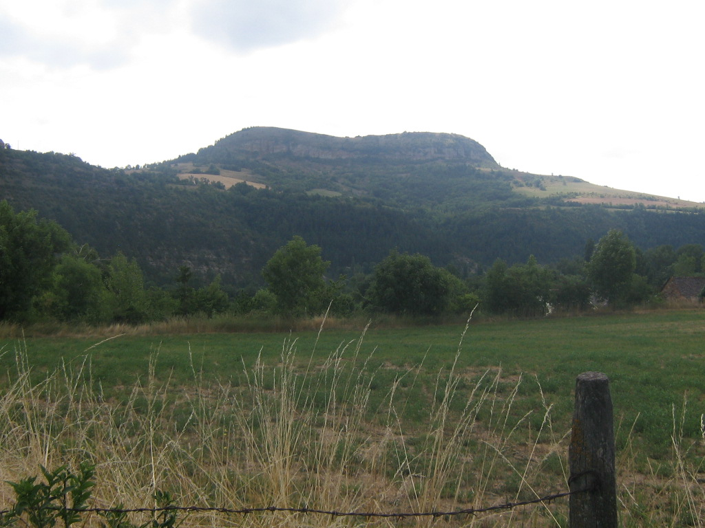 Le truc de Saint-Bonnet-de-Chirac (942 m)